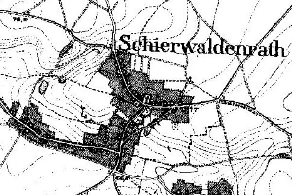 Neuaufnahme 1891-1912